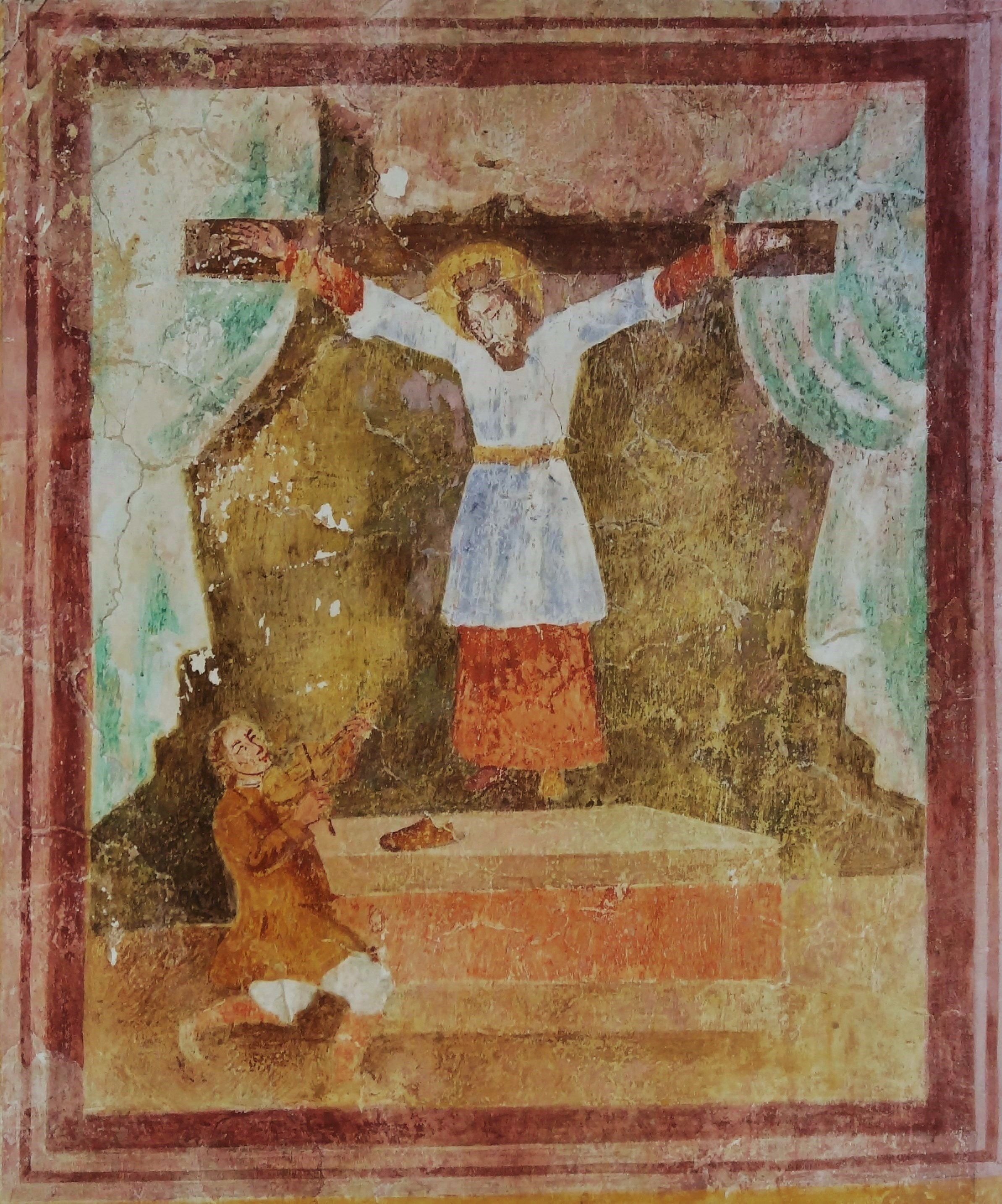 Schloss Rothenthurn bei Molzbichl, gotisches Fresko der hl. Kümmernis in der Kapelle